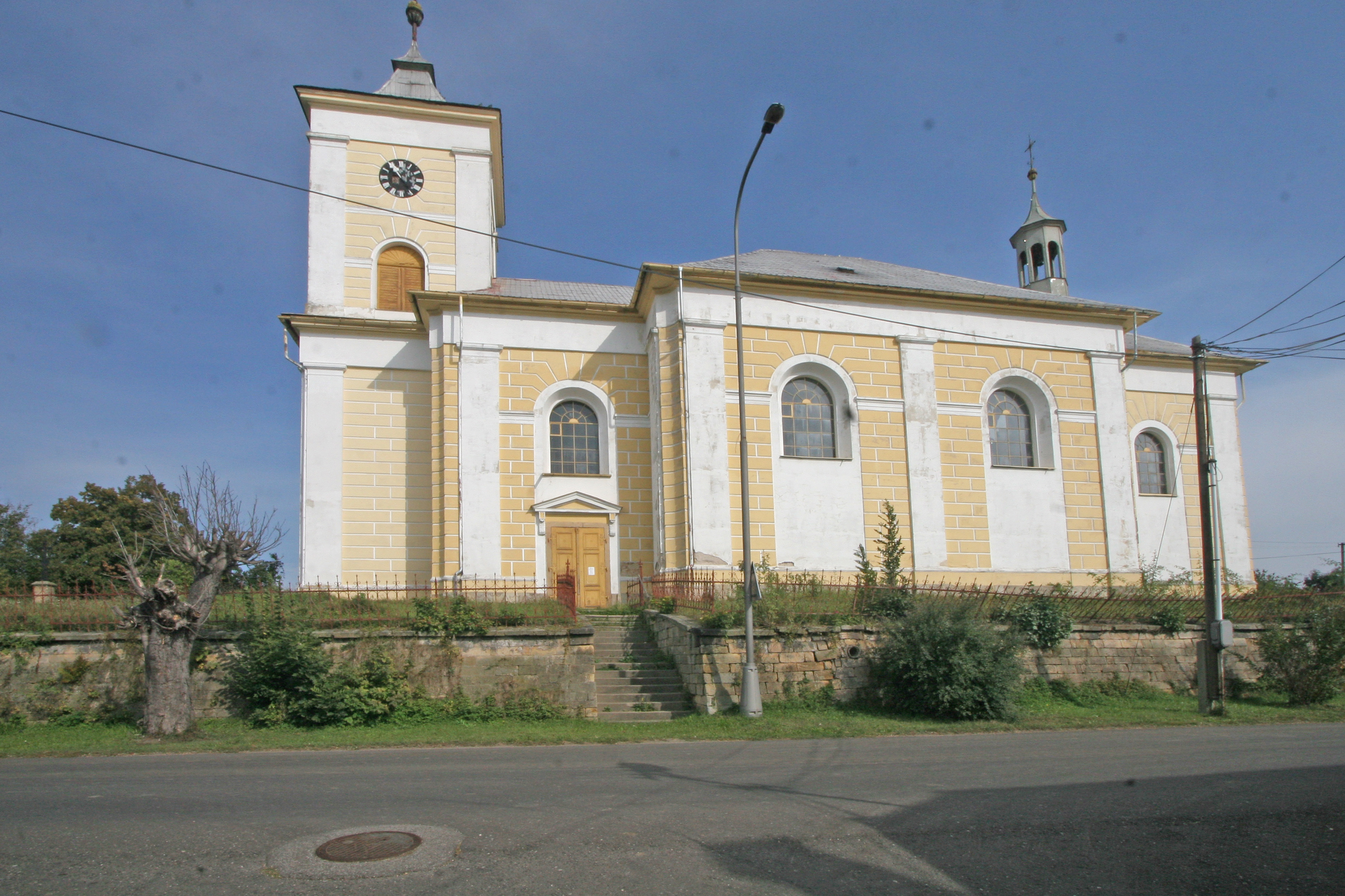 Kostel sv. Mikuláše Tolentinského (Vysoké Veselí), Vysoké Veselí